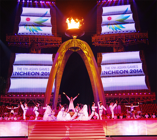 탈(THE TAL) 타악, 한국무용, 비보잉, 태권도가 조화를 이룬 공연으로 ‘아리랑’과 ‘태권도’의 앙상블과 완성도를 보여주는 넌버벌 퍼포먼스이다.